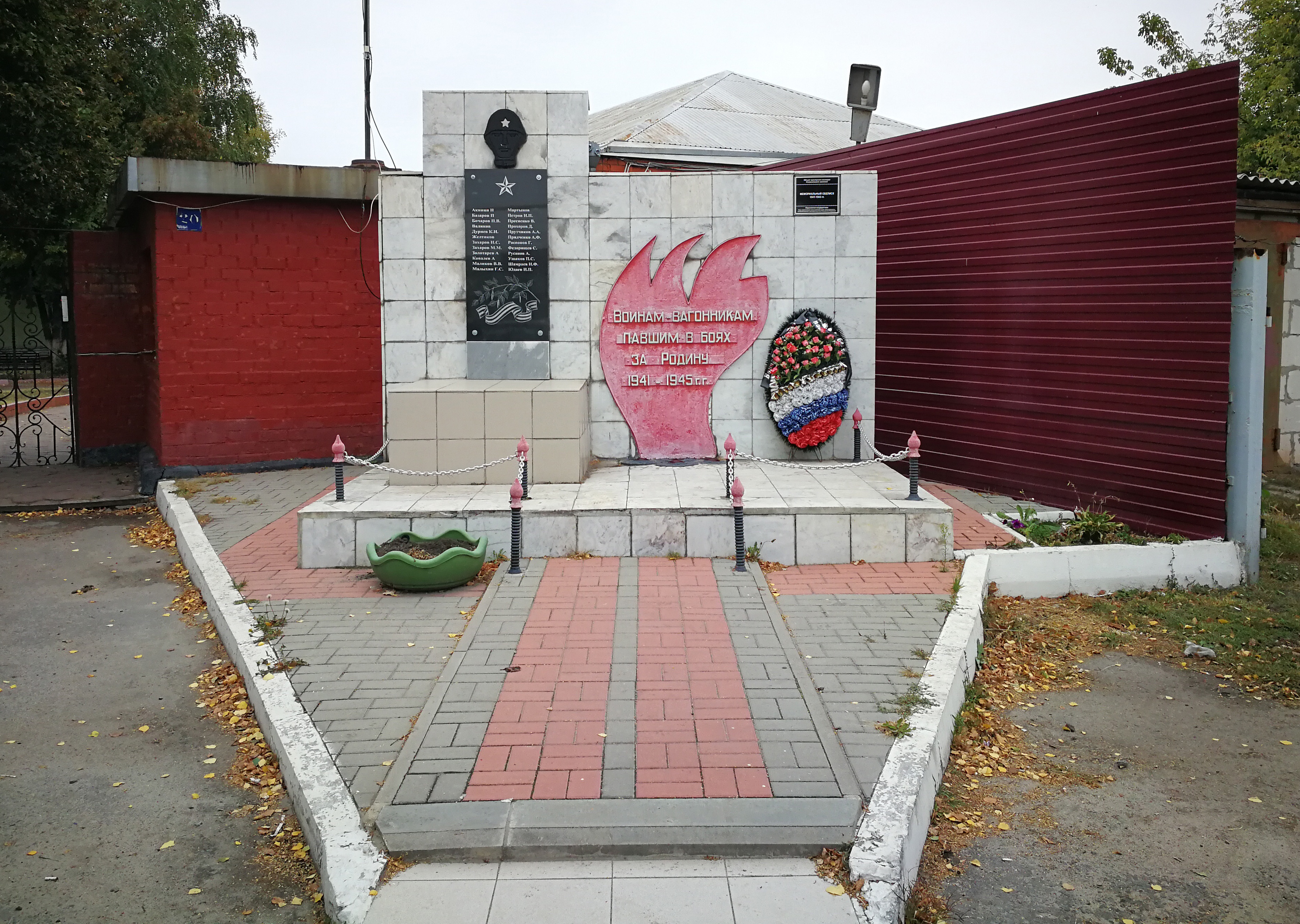 Мемориальный обелиск 1941-1943 гг.: у вагонного депо, Старый Оскол, Белгородская область возле дома №22 по ул.Свободы